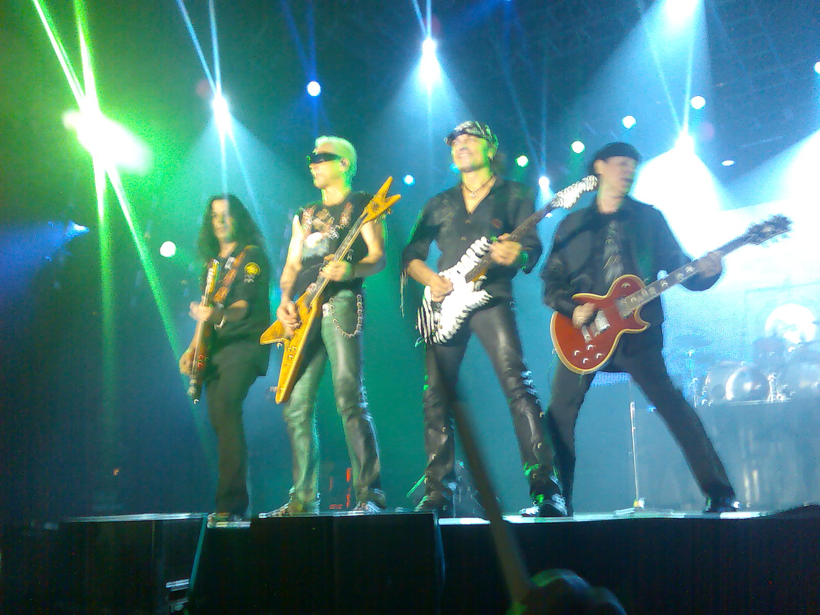 Klaus Meine, Matthias Jabs, Rudolf Schenker y Paweł Mąciwoda en el concierto de Almería.